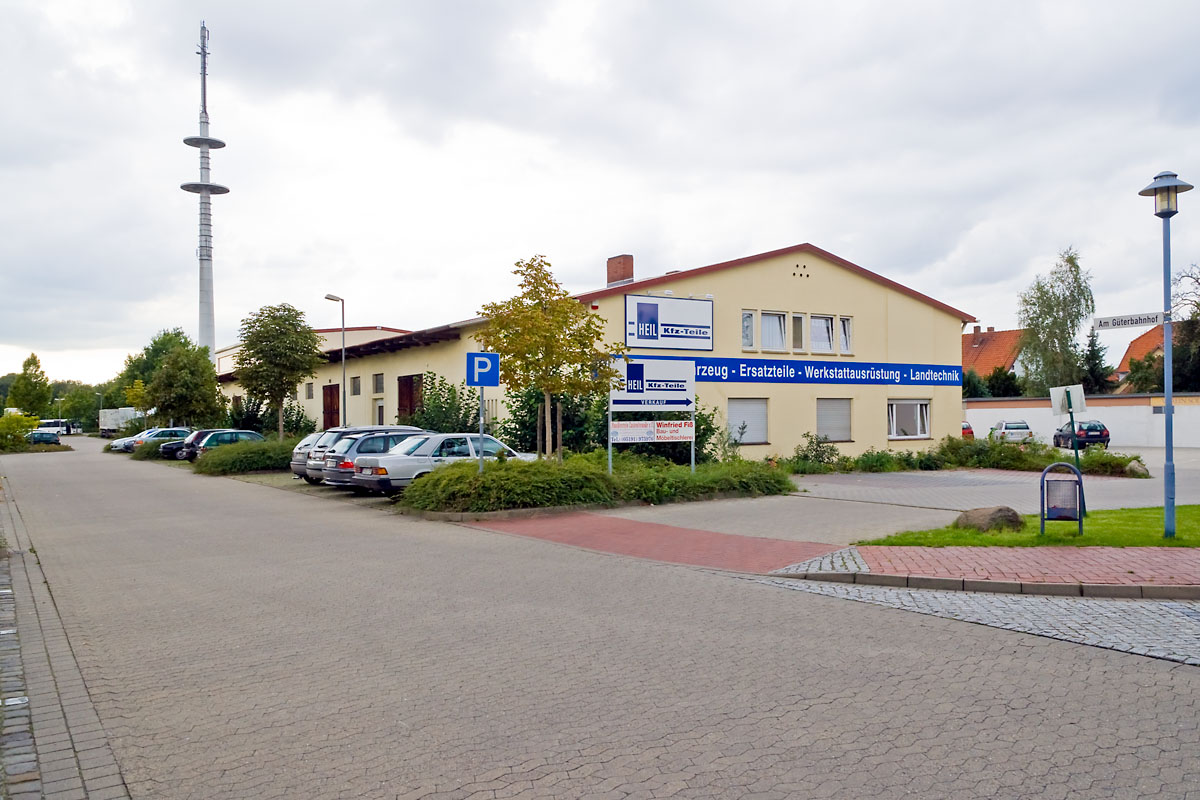 Bahnhof Soltau (Han): Die ehemals dem Güterverkehr dienenden Gebäude sind noch vorhanden, allerdings ohne Gleisanschluss. Die Gebäude befinden sich nicht mehr im Eigentum der Deutschen Bahn, sie werden heute von verschiedenen Unternehmen gewerblich genutzt.